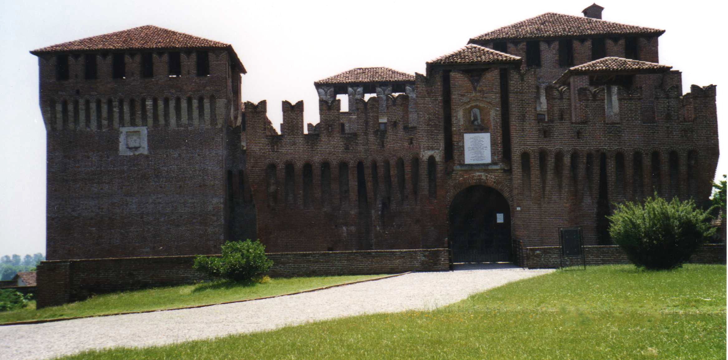 Author Giorces. Soncino - Castello visconteo.